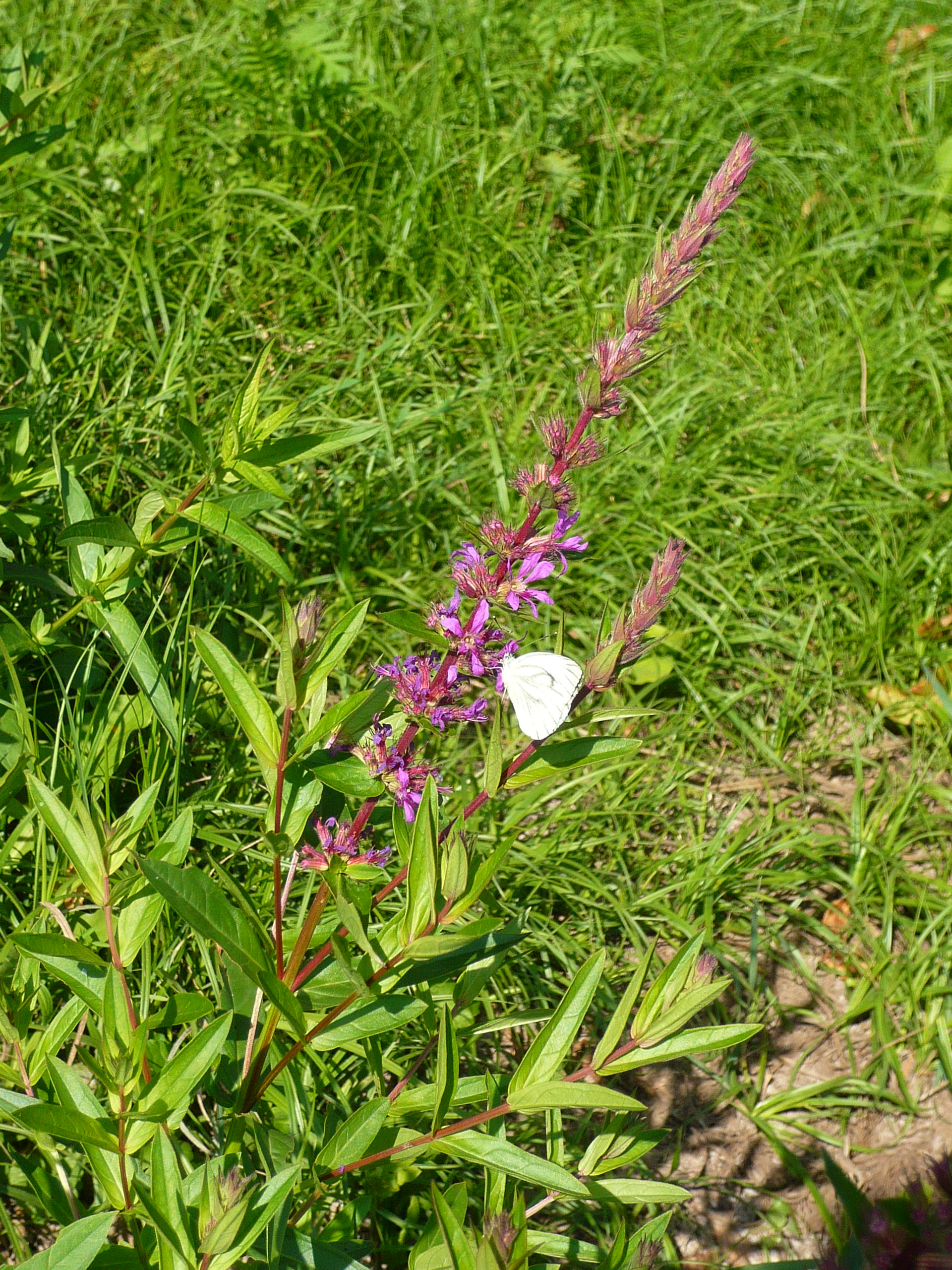 Gewöhnlicher Blutweiderich (Lythrum salicaria) mit Kohlweißling – Impression aus dem Schutzwald „Schützenhaus“, Alt Zauche-Wußwerk, Brandenburg